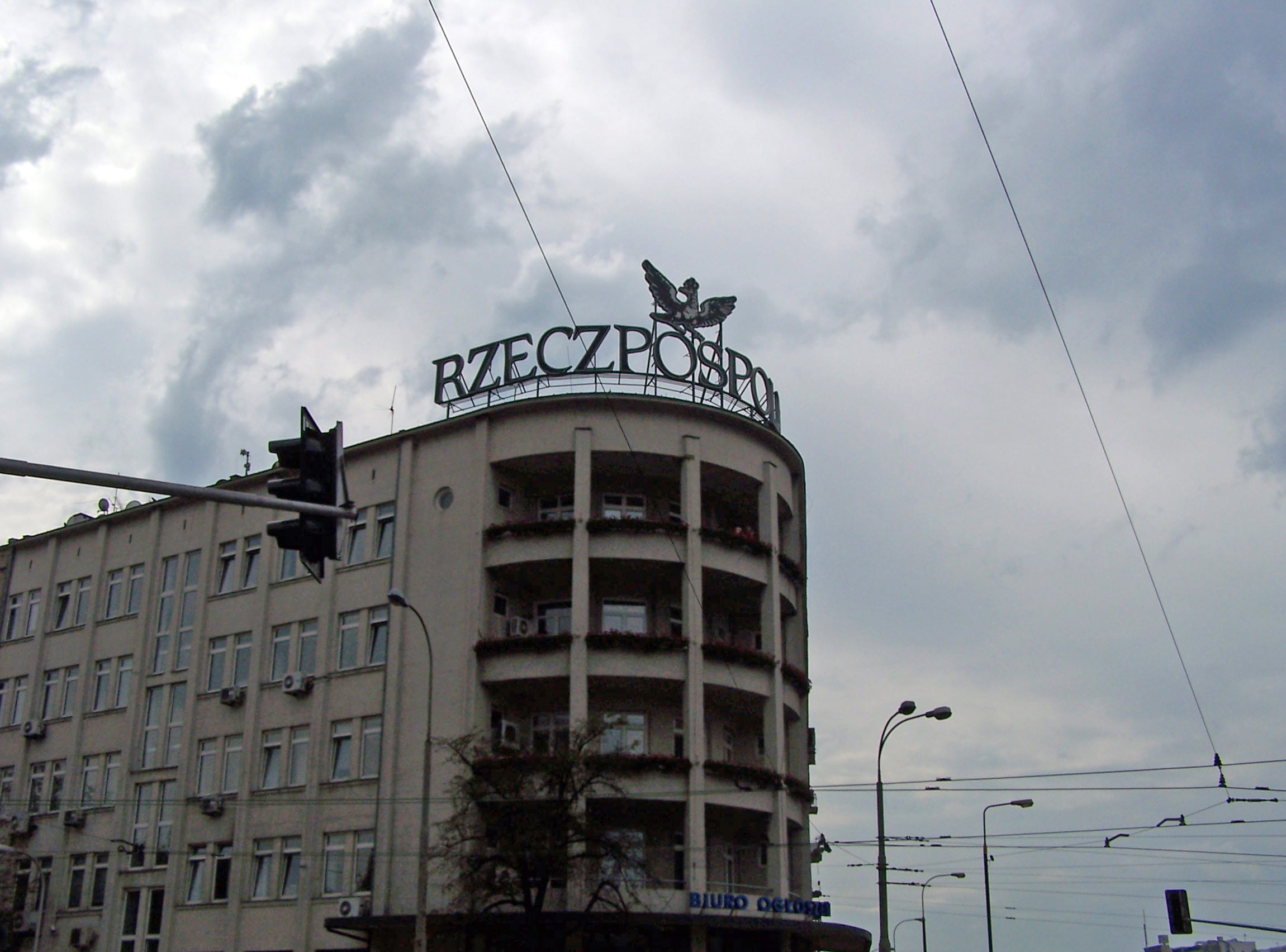 Photo by Piotrus. Rzeczpospolita